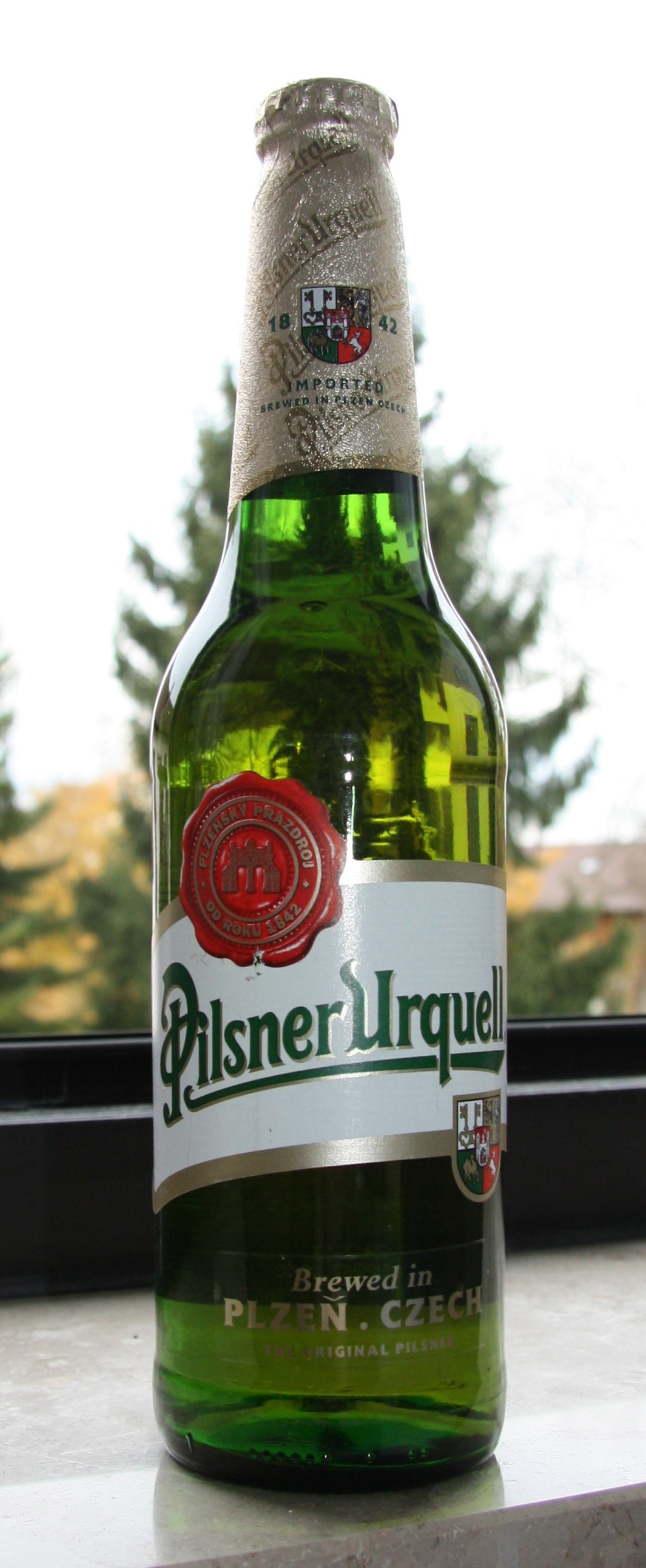 Pilsner Urquell, gekauft in Deutschland.